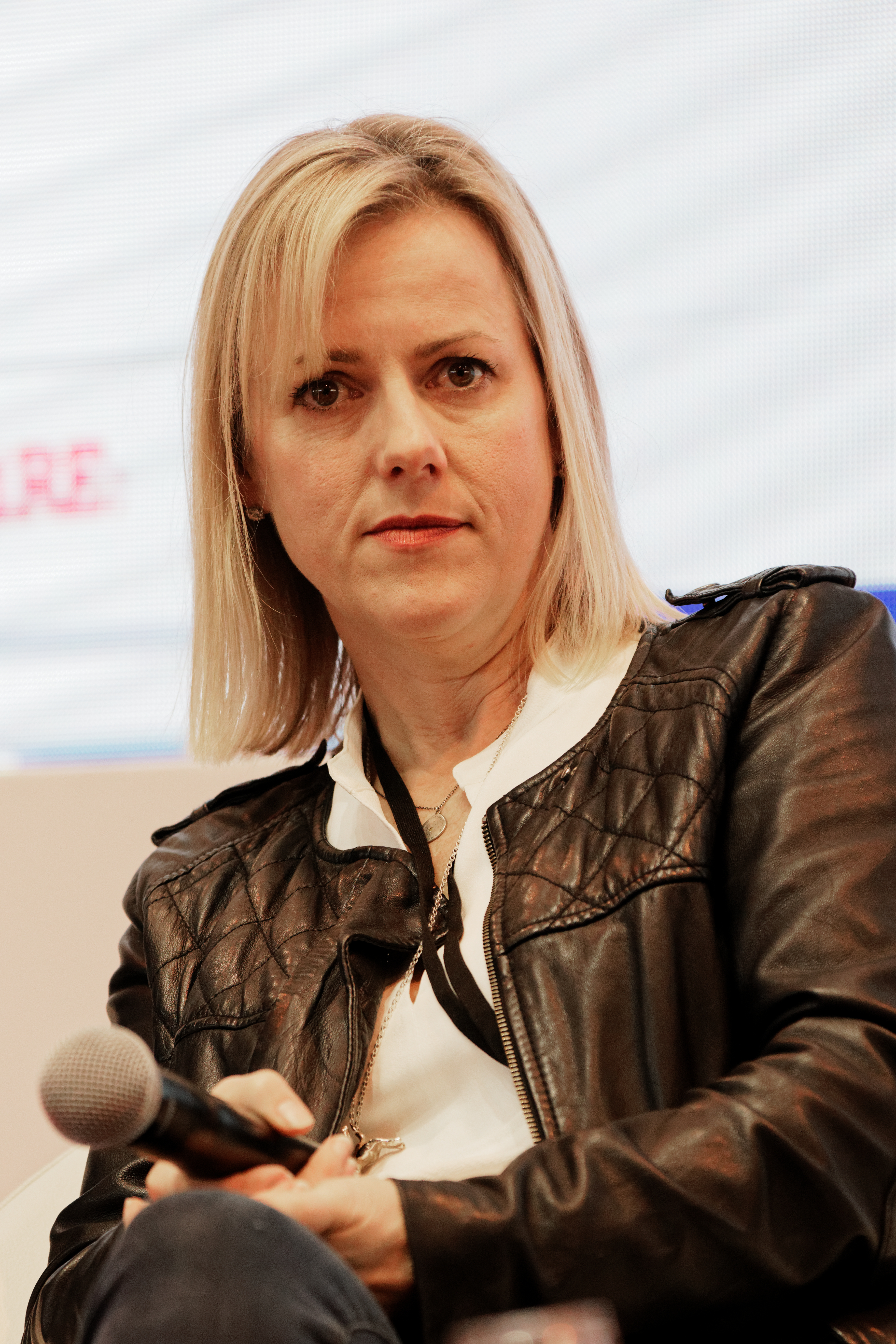 Jojo Moyes en conférence lors du salon du livre de Paris 2017.